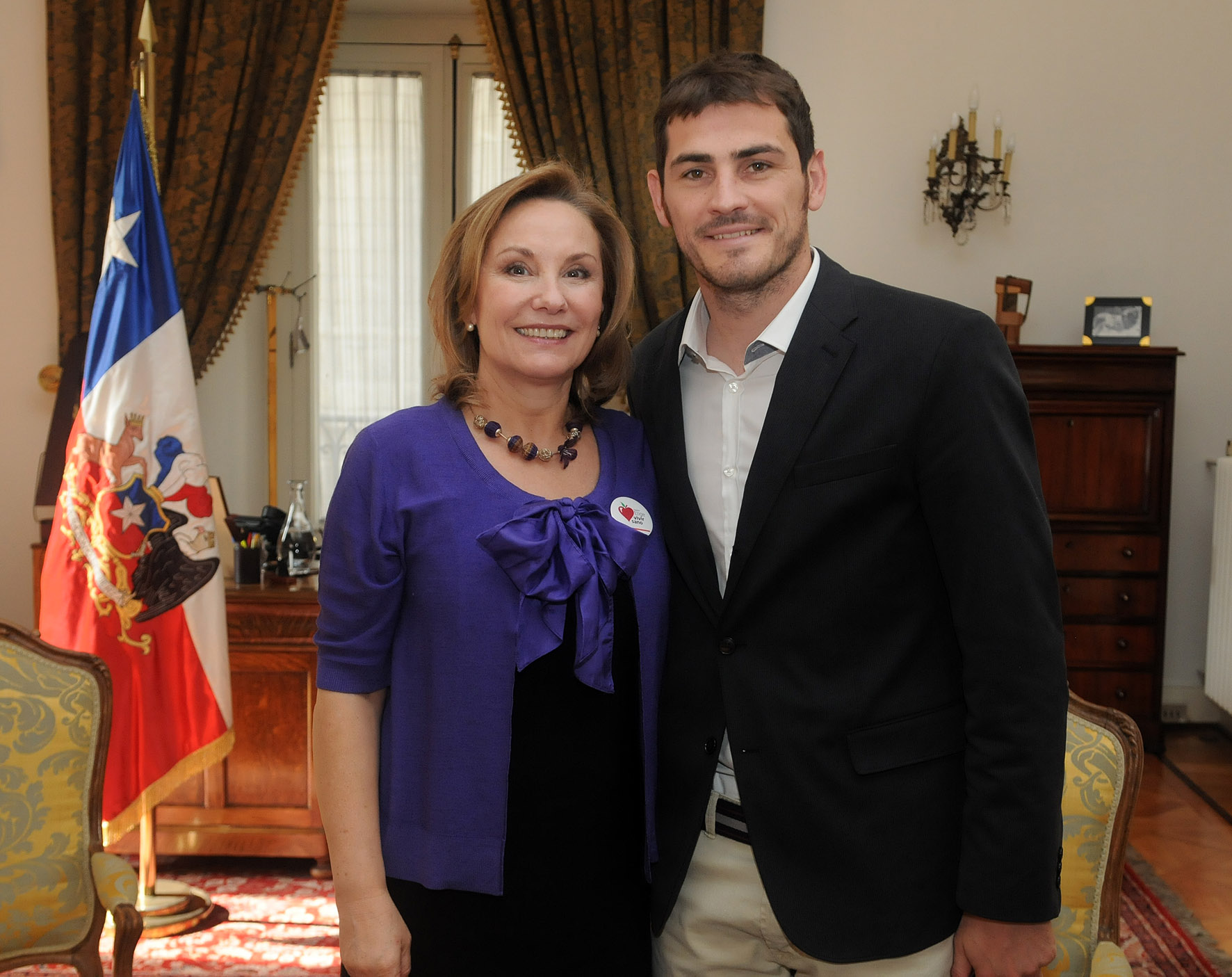 14-6-2011 Visita Iker Casillas al Palacio de La Moneda en Chile. En la foto junto a la Primera Dama Cecilia Morel.